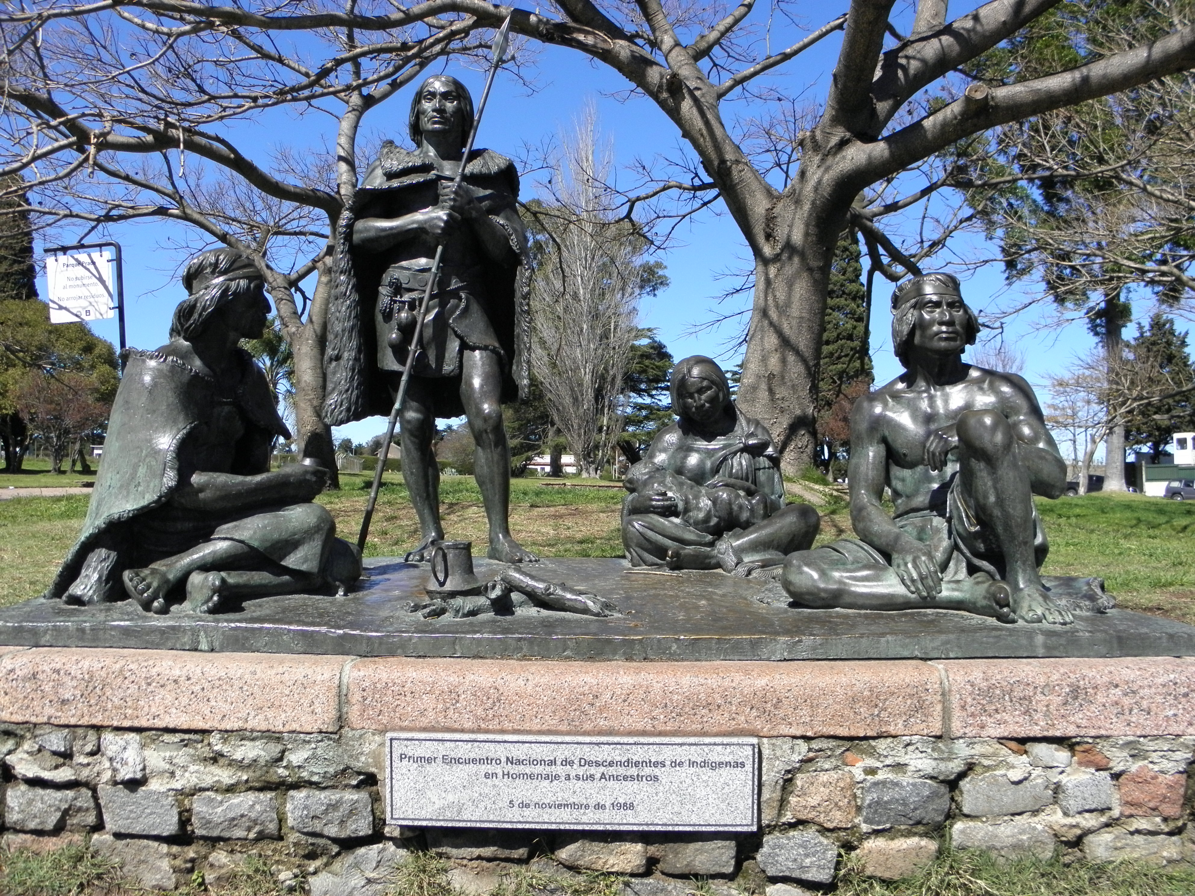 Los últimos charruas. Ubicada en el departamento de Montevideo